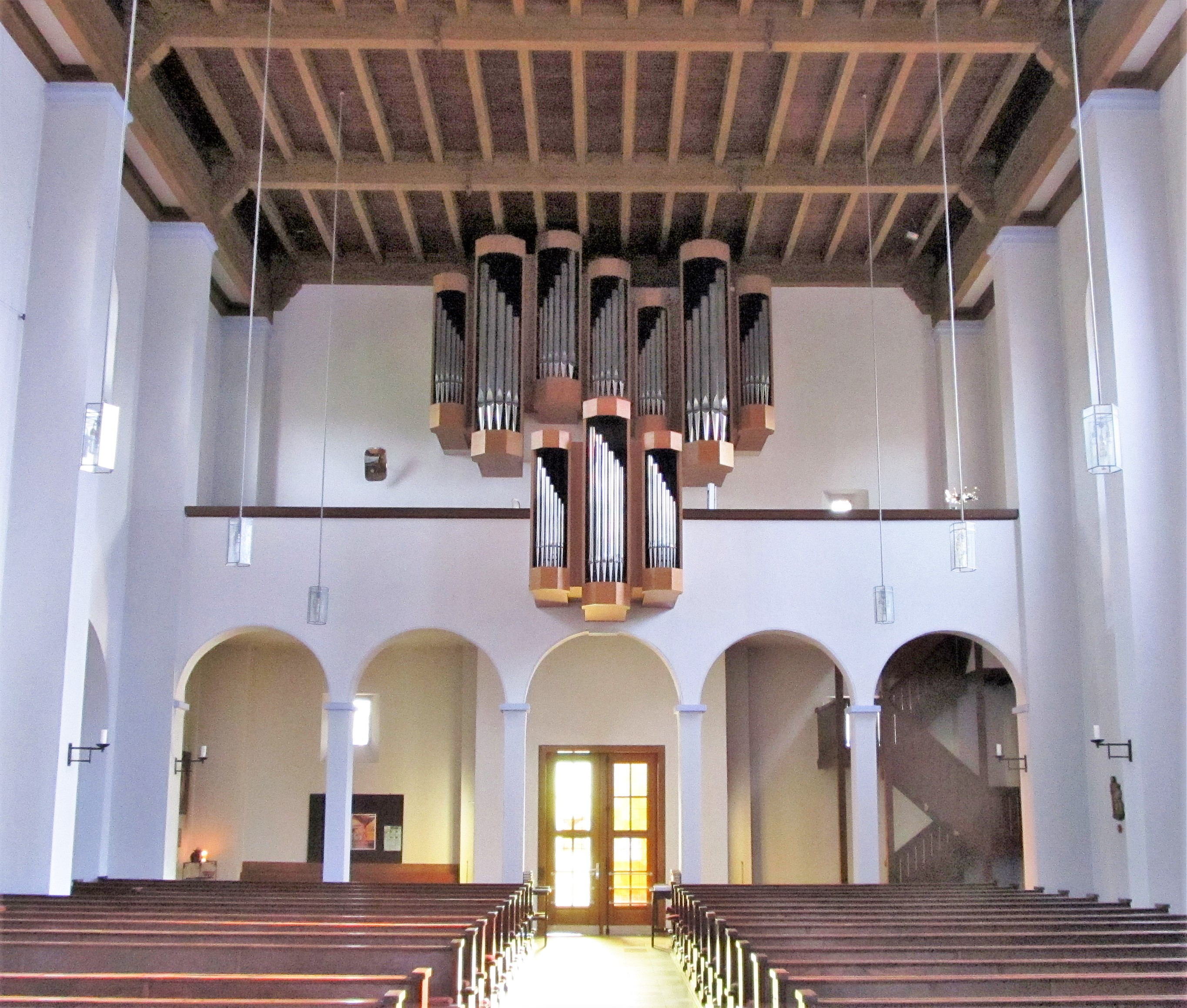 Das Innere der katholischen Pfarrkirche Herz Jesu in Hassel, Saarland